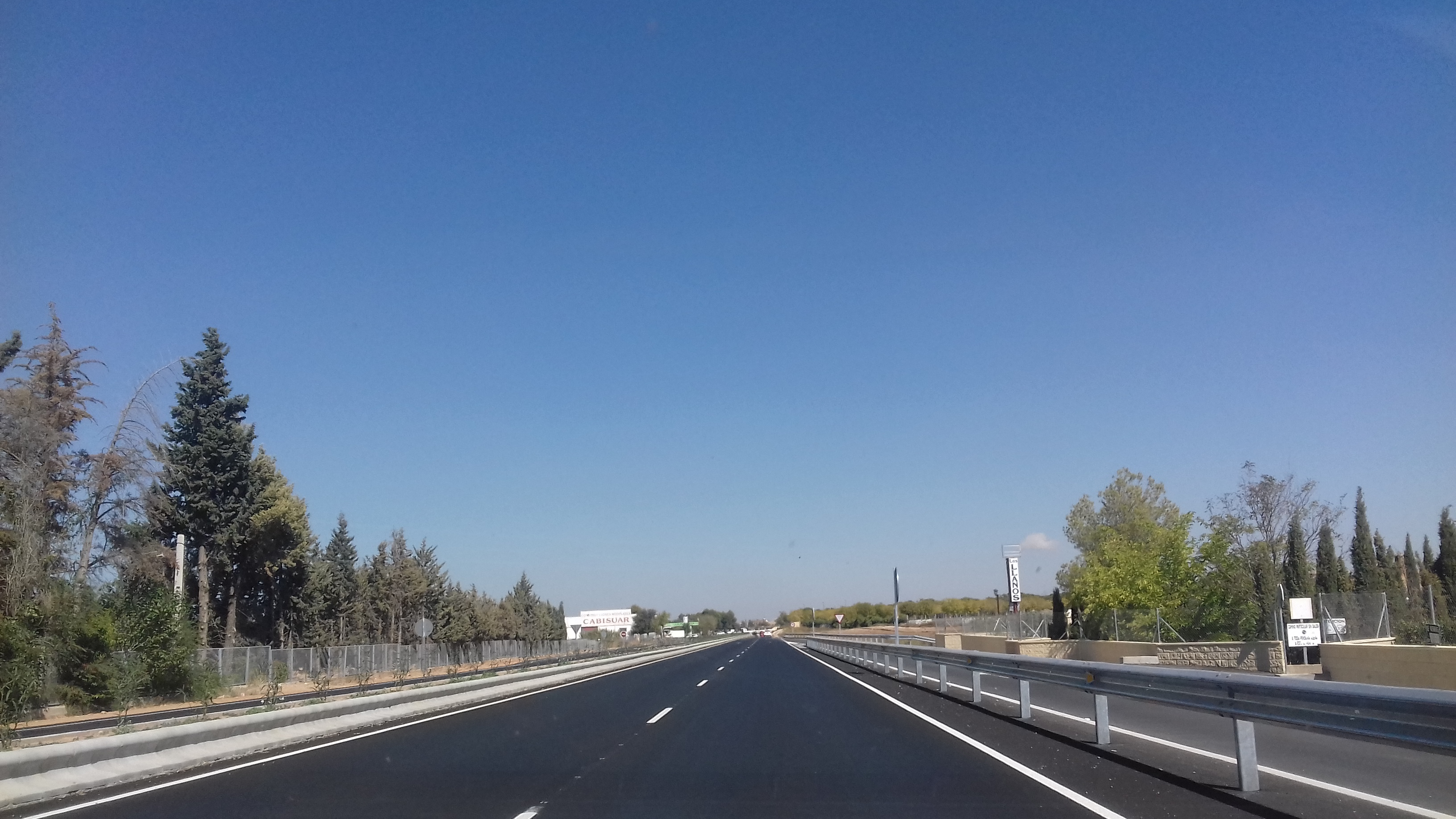 Vsta de la autovía de Los Llanos de Albacete.